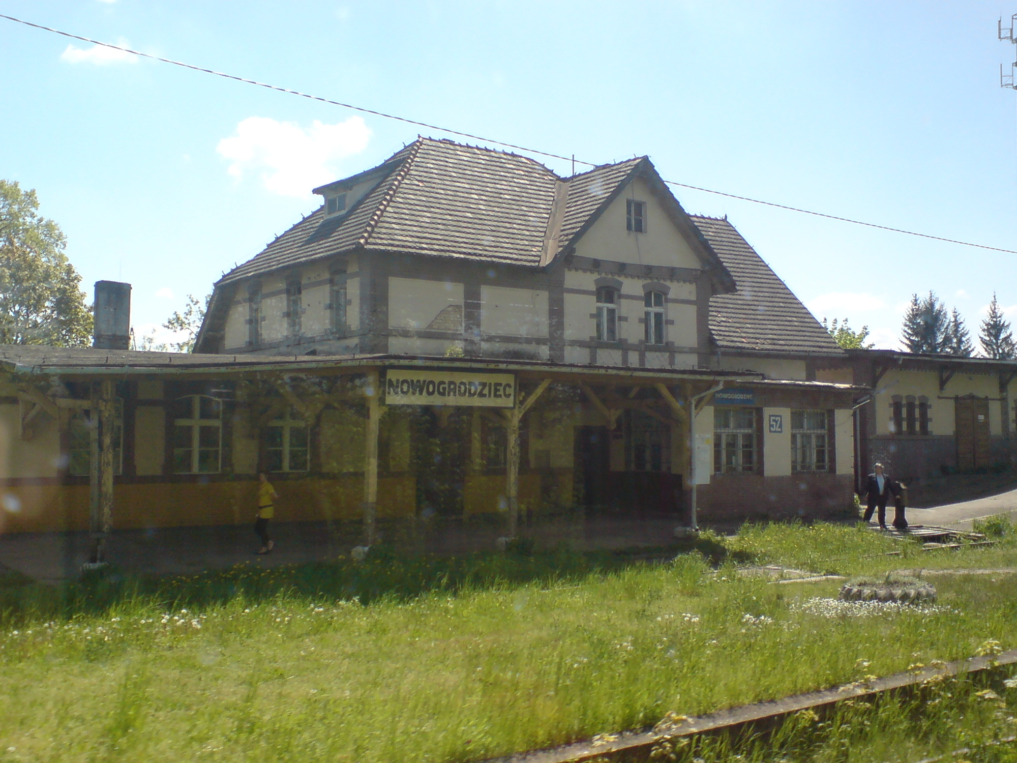 Stacja kolejowa w Nowogrodźcu, powiat bolesławiecki